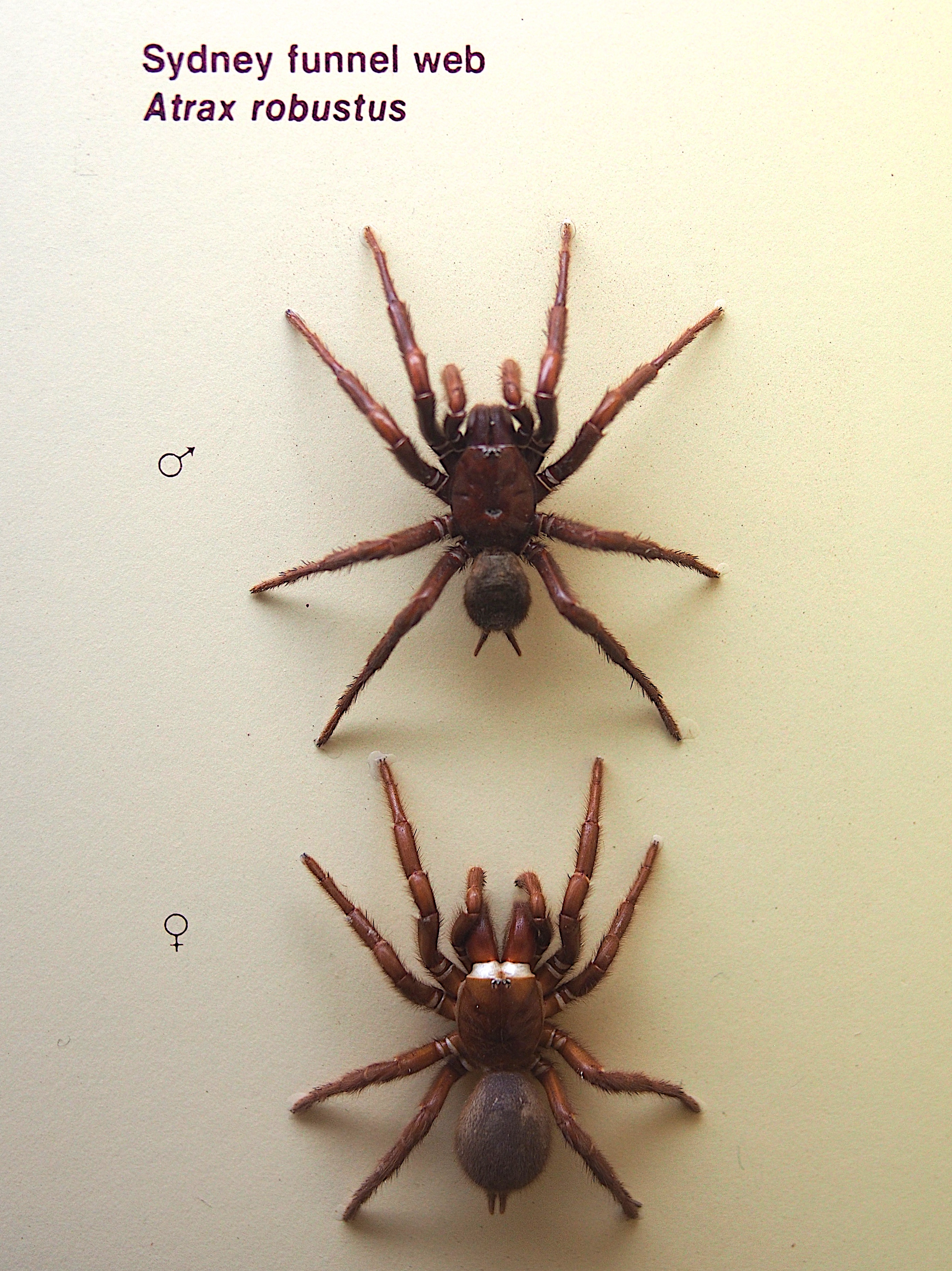 Sydney funnel-web spider (Atrax robustus) on display at the Australian Museum, Sydney.